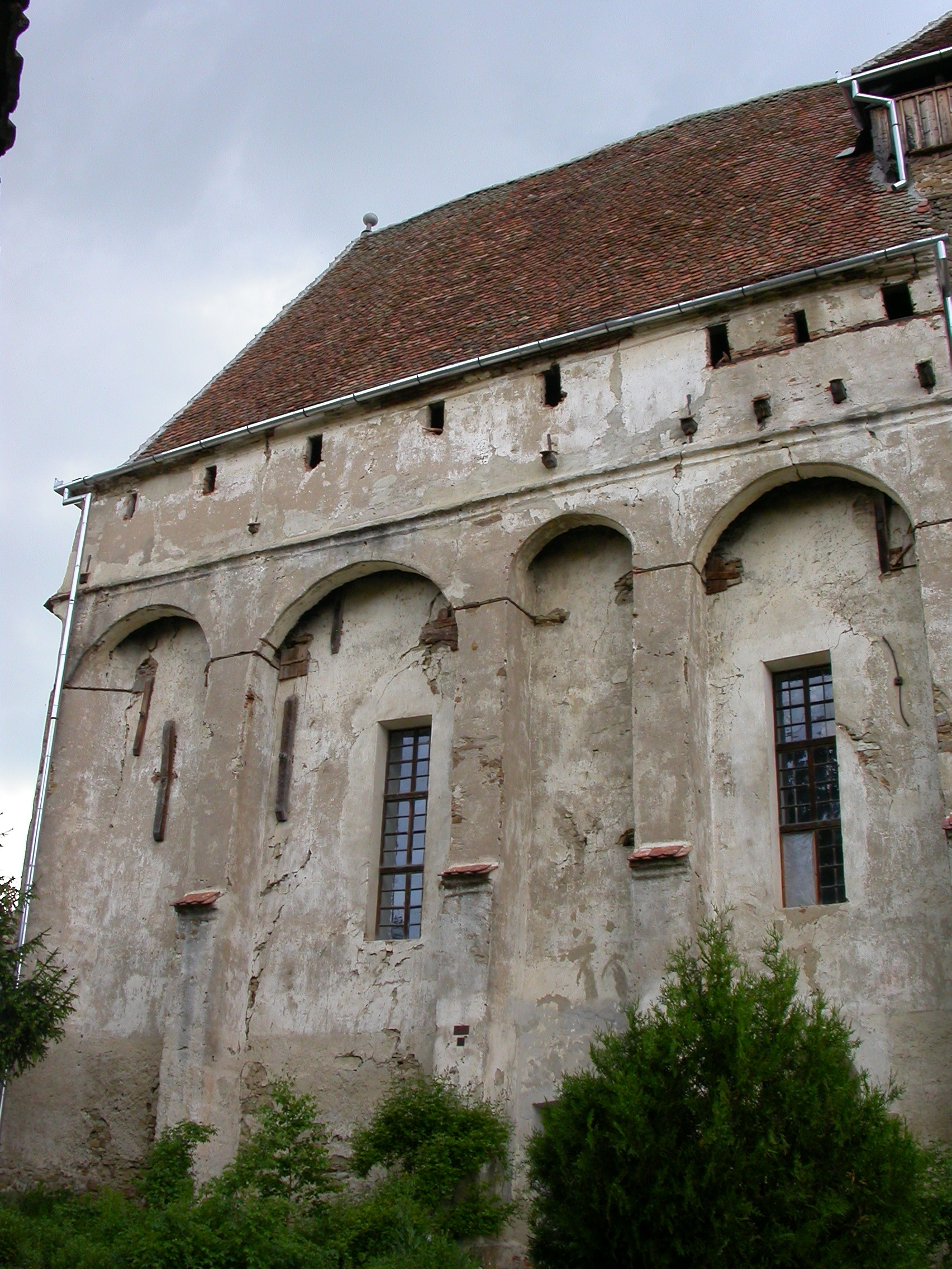 Ansamblul bisericii evanghelice fortificate, sec. XIV - XIX